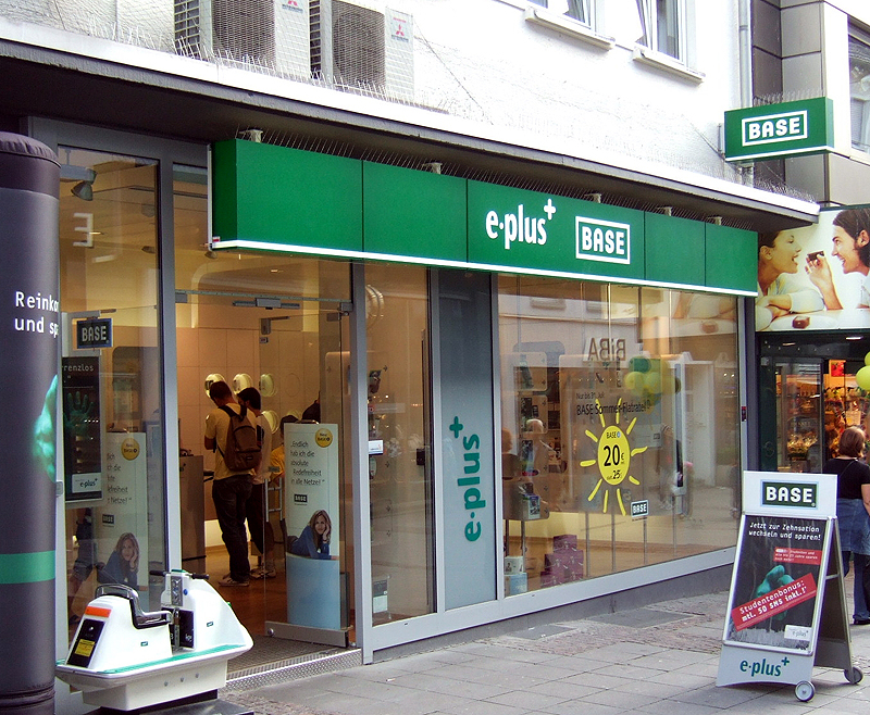 E Plus-Geschäft